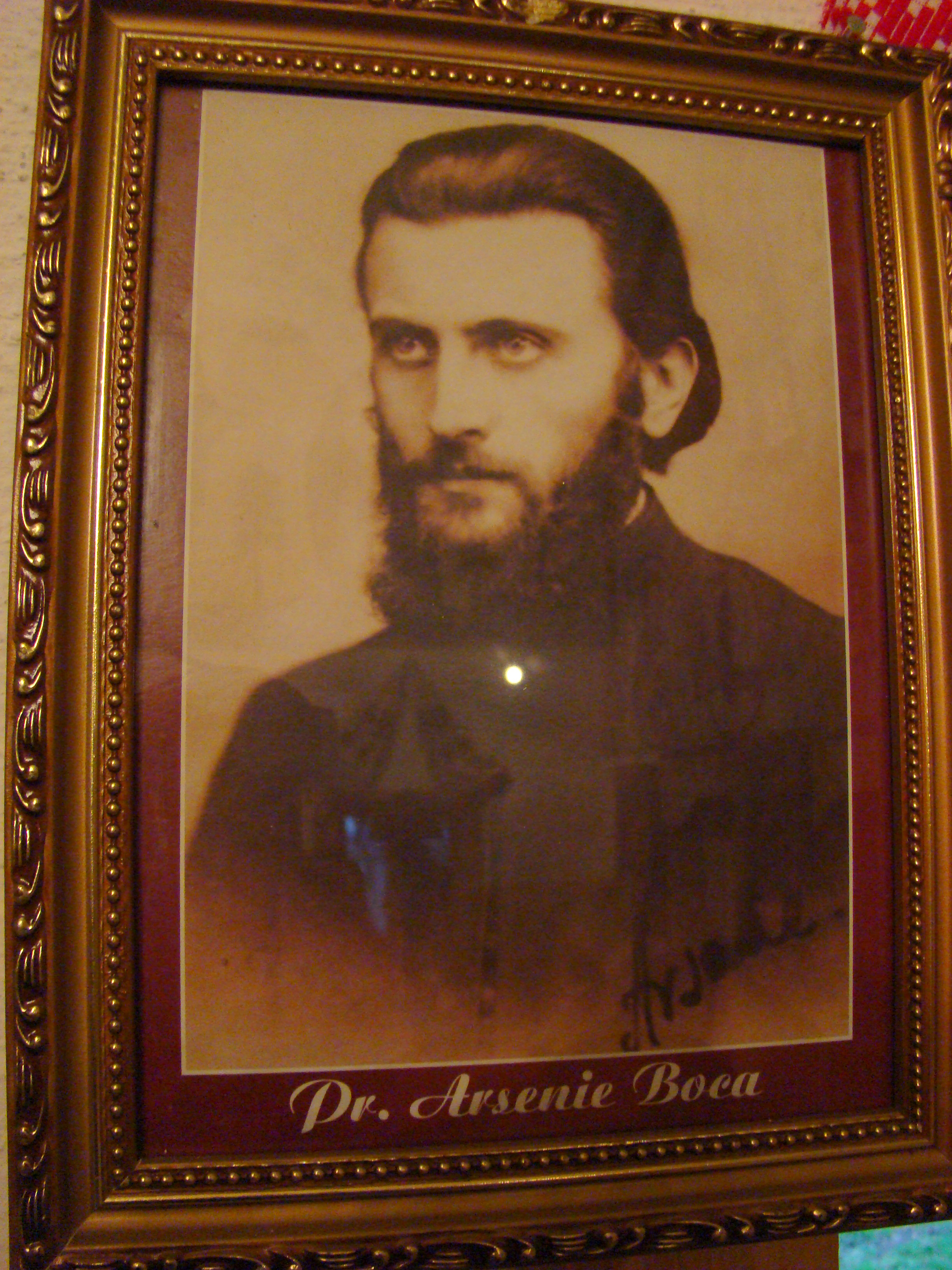 Biserica de lemn „Adormirea Maicii Domnului”,sat STĂNIJA; comuna BUCEŞ